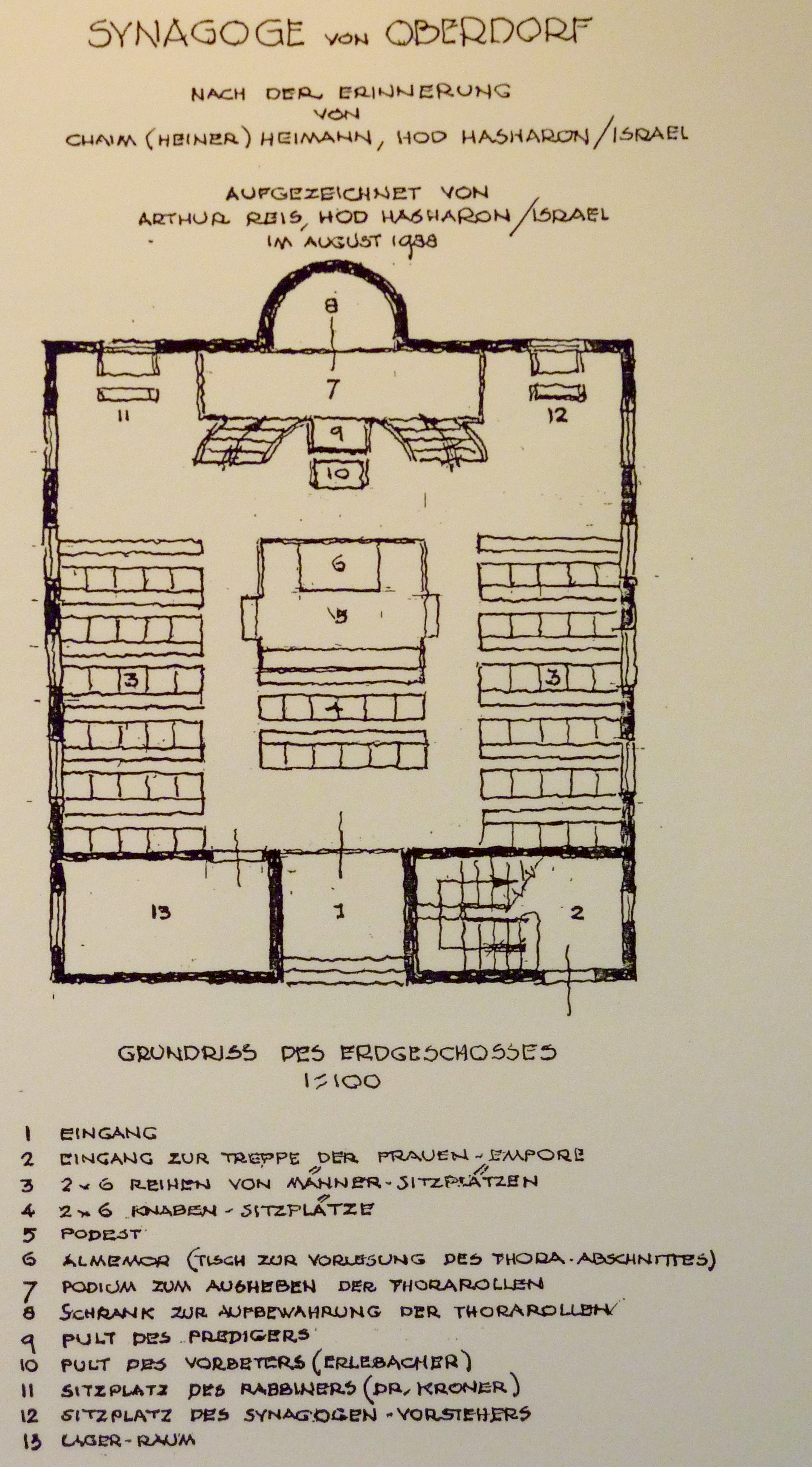 Synagoge in Oberdorf am Ipf im Ostalbkreis (Baden-Württemberg)